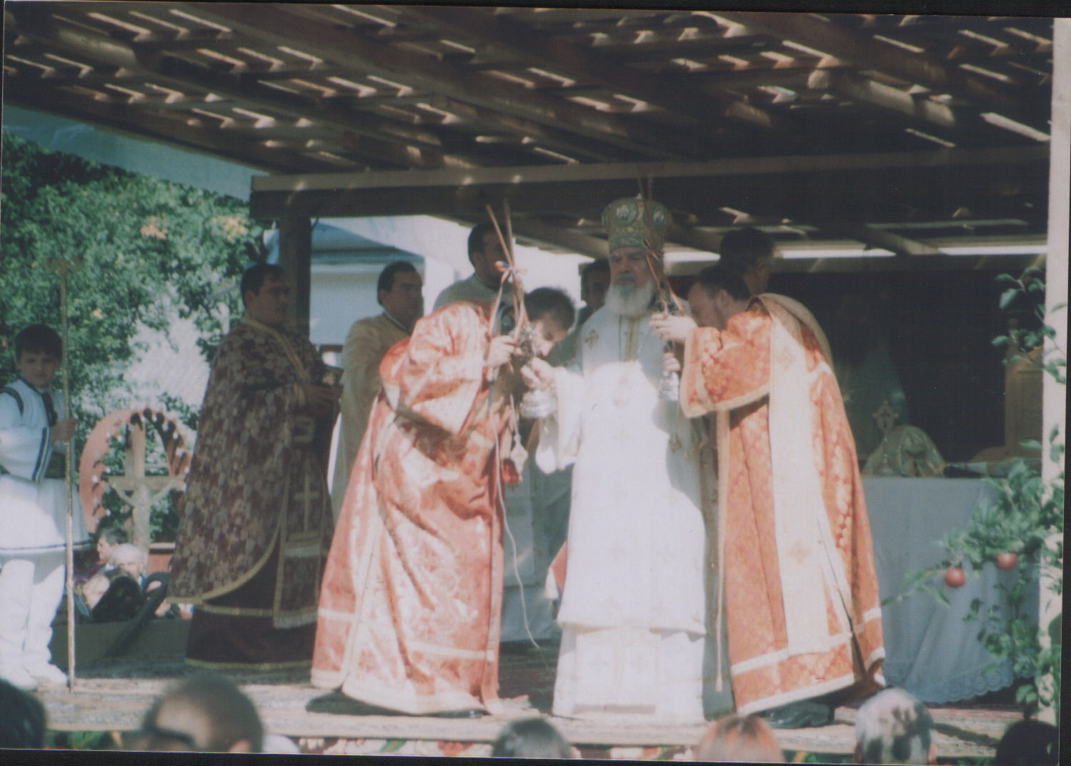 IPS Bartolomeu (foto 07.09.2003)